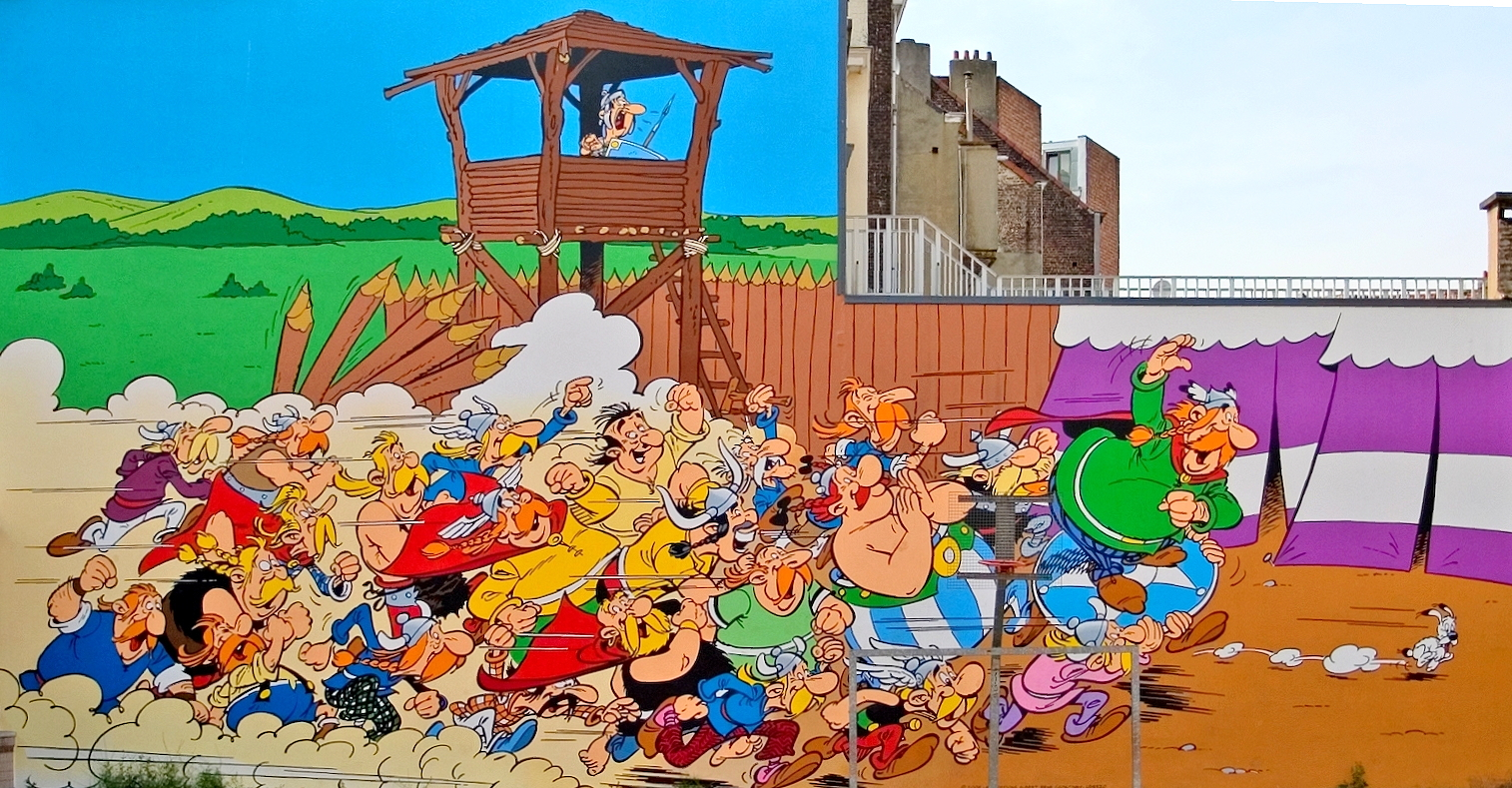 Figuren aus den „Asterix und Obelix“-Comics von Goscinny und Uderzo, Comicwand in Brüssel, 33 rue de la Buanderie